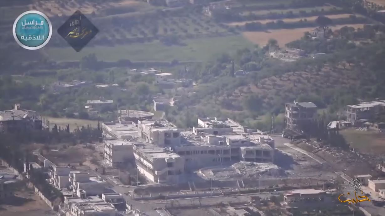 L'hôpital de Jisr al-Choghour, défendu par l'armée syrienne et assiégé par les djihadistes en mai 2015.